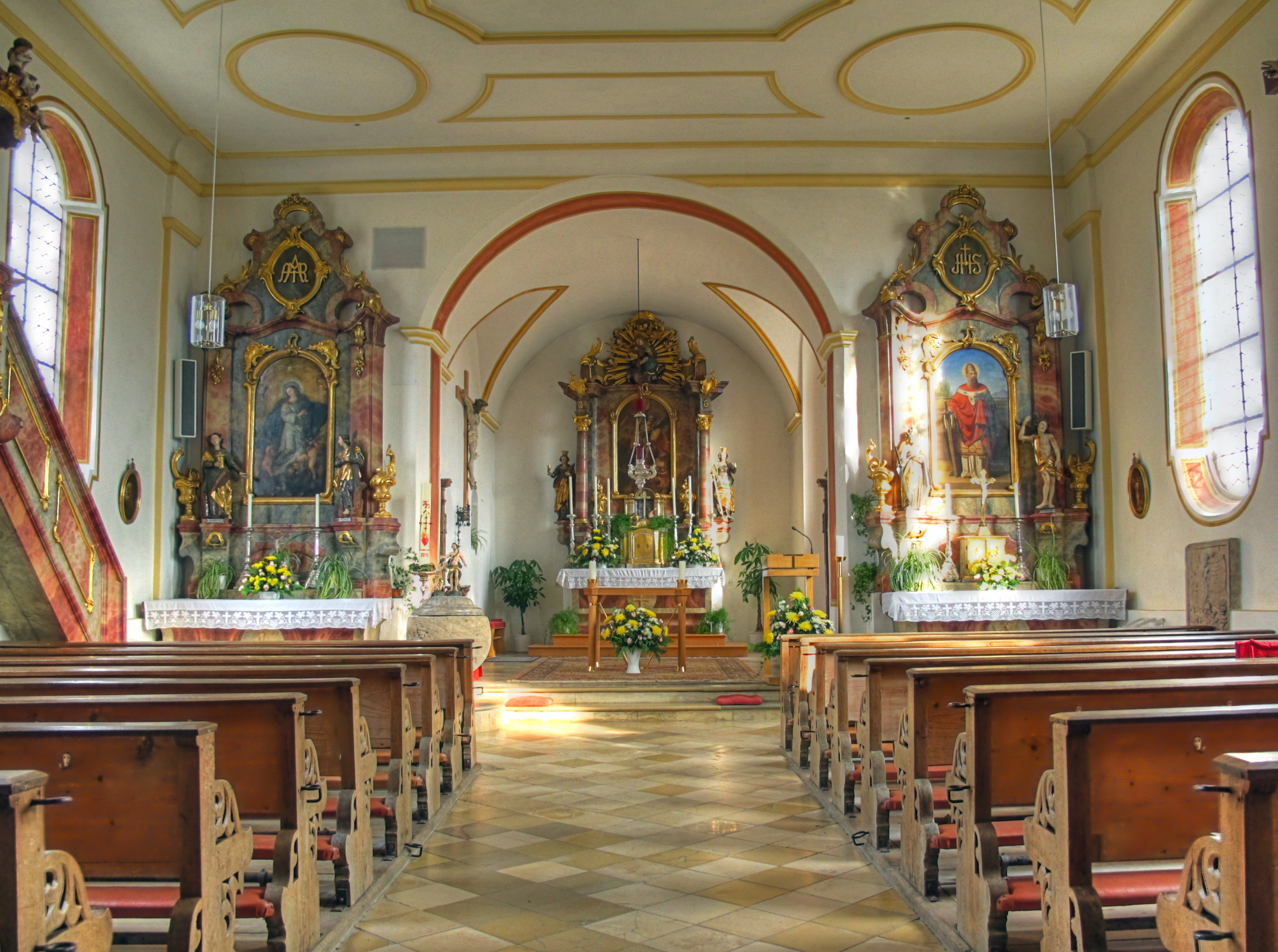 Deutschland, Bayern, Landkreis Starnberg, Gemeinde Seefeld, Ortsteil Hechendorf, Pfarrkirche St. Michael, Innenraum, Haupt- und Nebenaltäre